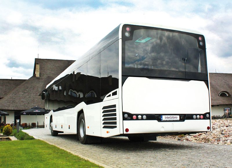 InterUrbino